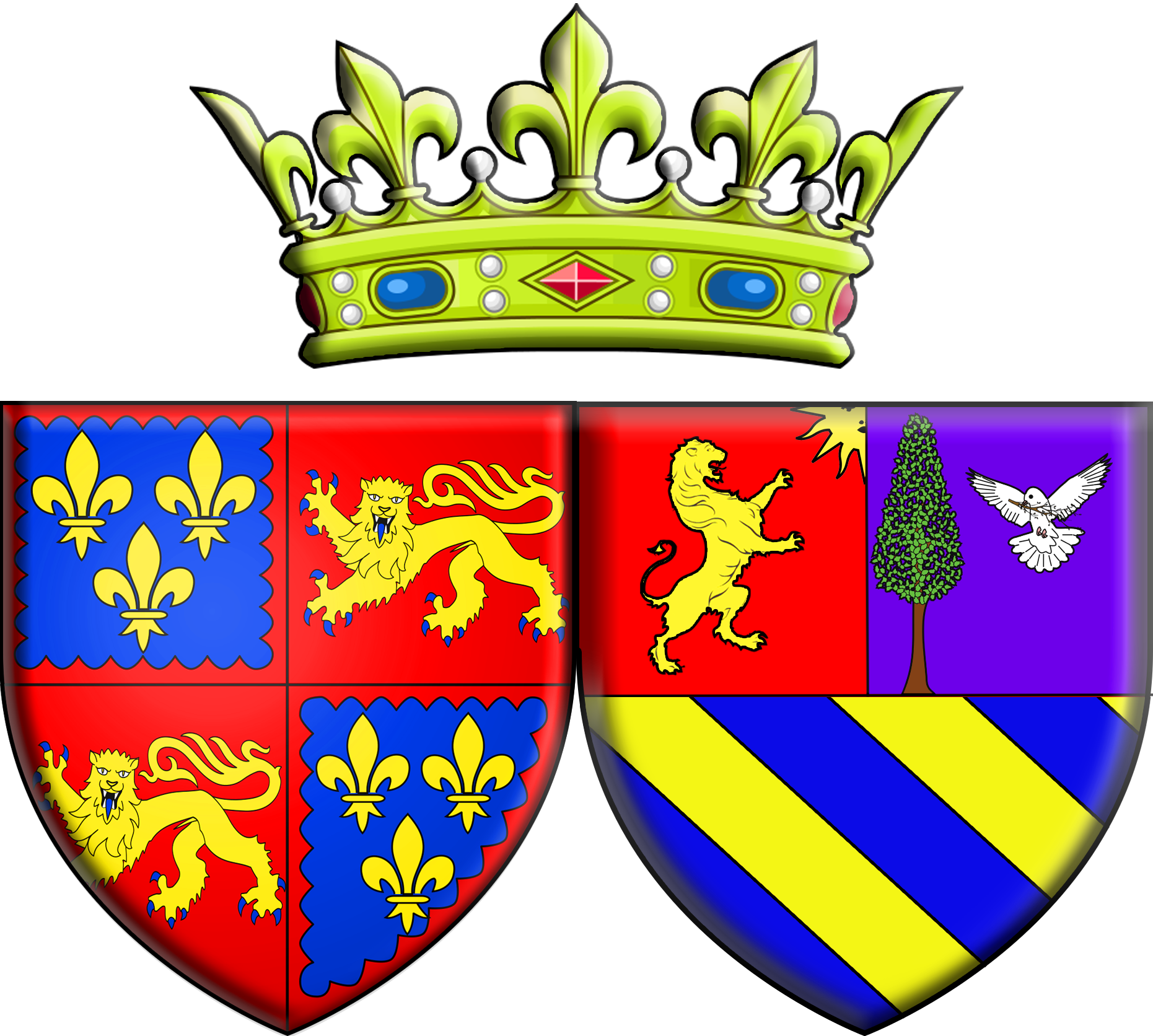 Armoiries de la Princesse Emmanuelle de Bourbon, duchesse d'Aquitaine